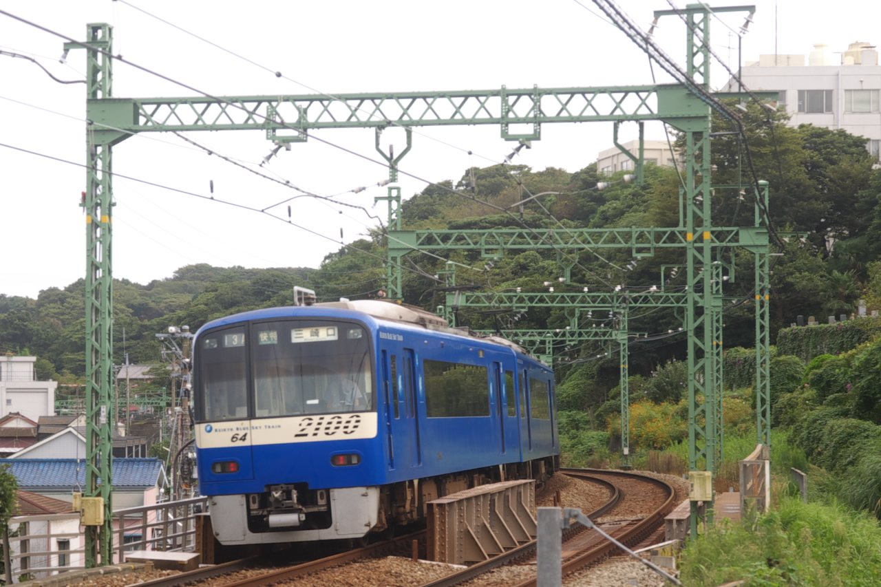 横須賀中央-県立大学(安浦)間を走行中の京急2100形の快特三崎口行き。 京急と言えば赤い電車というイメージがあるので、青い電車はちょっと違和感がある。 PENTAX K100D+SIGMA 17-70mm/F2.8-4.5